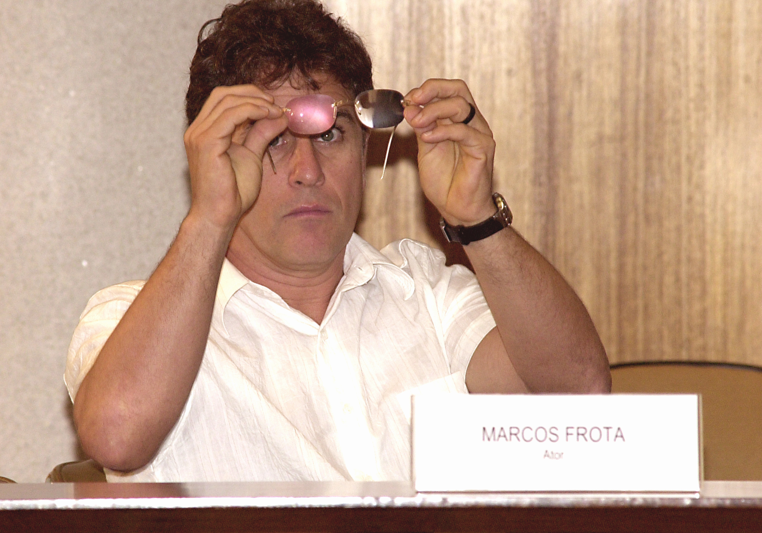 Brasília - O ator Marcos Frota participa da solenidade de assinatura de autorização a consulta pública de instituições do Programa de Atendimento às Pessoas com Deficiência, a ser implementada com recursos do FUST, durante reunião do Conselho Nacional dos Direitos da Pessoa Portadora de Deficiência (Conade), na sede da Confederação Nacional de Comércio.